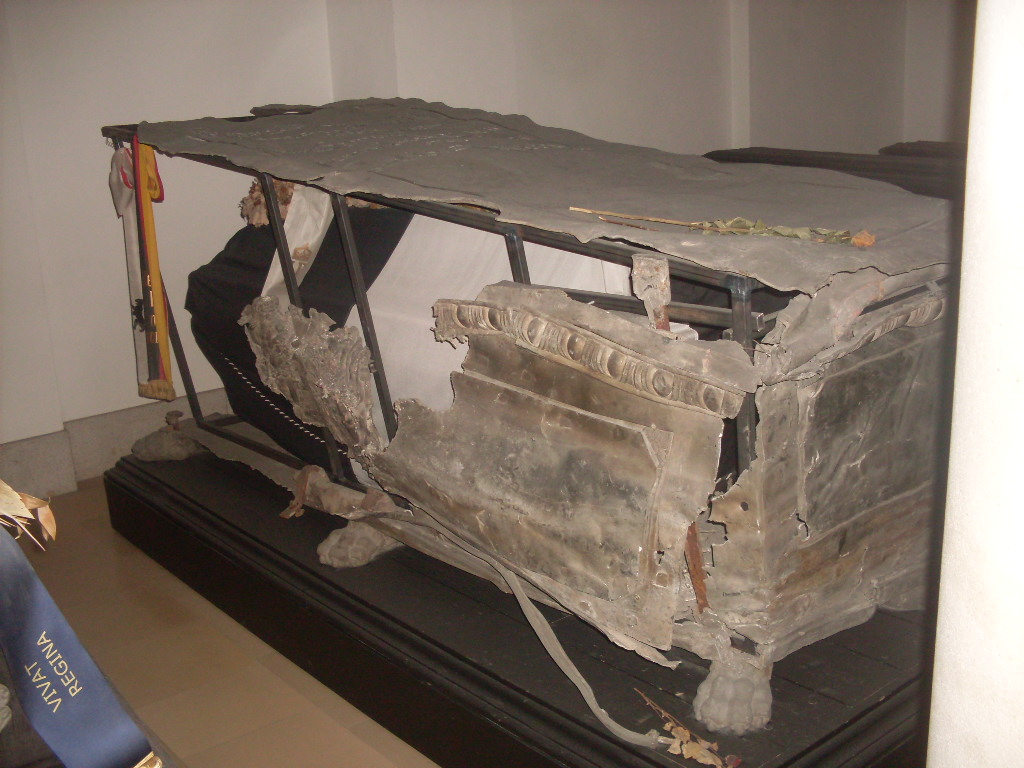 Sarkophag Friedrich Wilhelms II. von Preußen in der Hohenzollerngruft des Berliner Domes (Nr. 61)